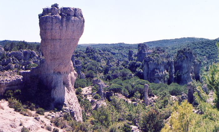 Description: Petit aperçu du Cirque de Mourèze, France, Hérault Source: Hugo Soria Licence: GFDL Hugo Soria